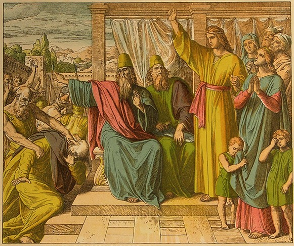 Daniel saves Susannah